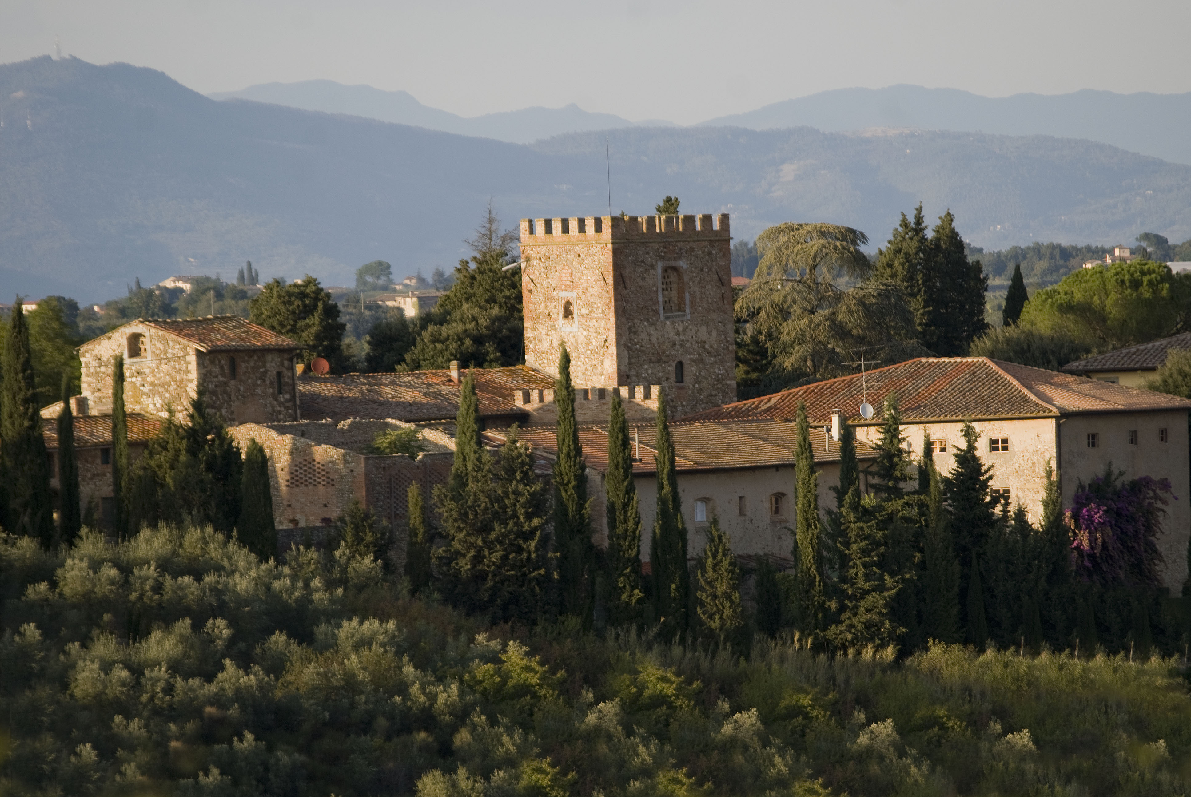 Castello di Poggio Petroio - Tavarnelle in Val di Pesa